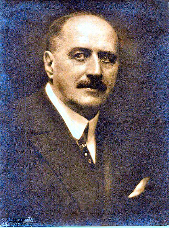 Georg Graf Wassilko v. Serecki